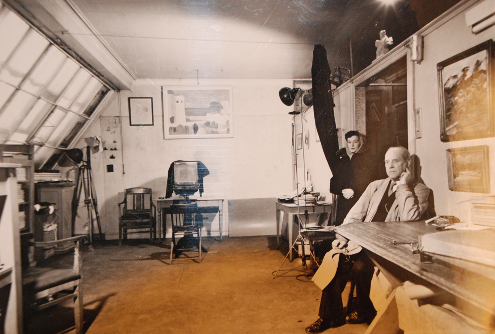 Ragnvald Væring fotografert i sitt studio